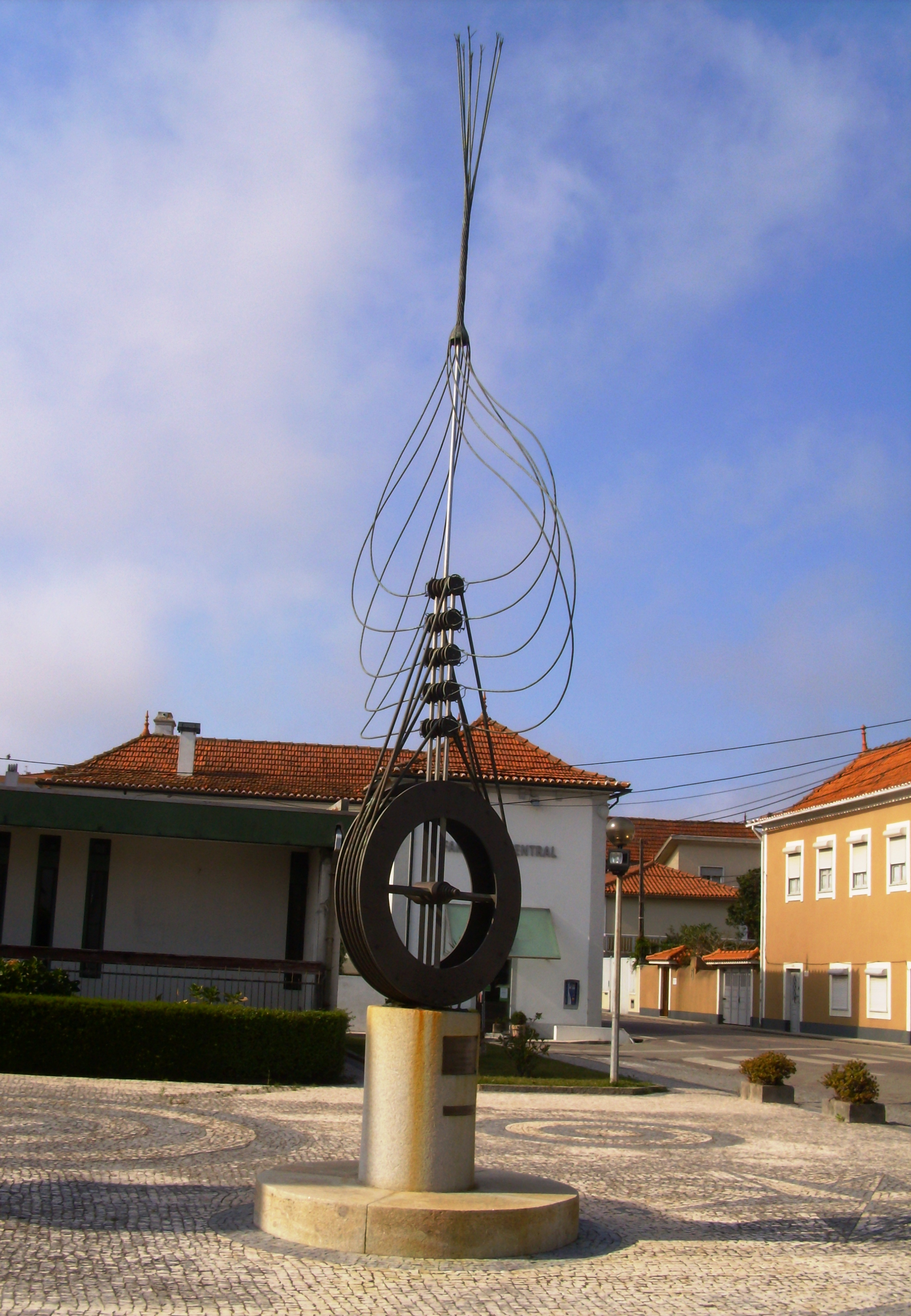 "Memória das Origens da Cordoaria / Homenagem aos Cordoeiros / Cortegaça - 1990 / Oferta de Álvaro Rola". Autoria: José Aurélio (Alcobaça). Largo 25 de Setembro, Cortegaça, concelho de Ovar, distrito de Aveiro, Portugal.